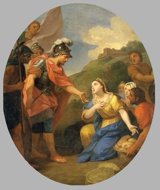 David et Abigail, par Louis de Boullogne, musée du Louvre, inv. 8548.